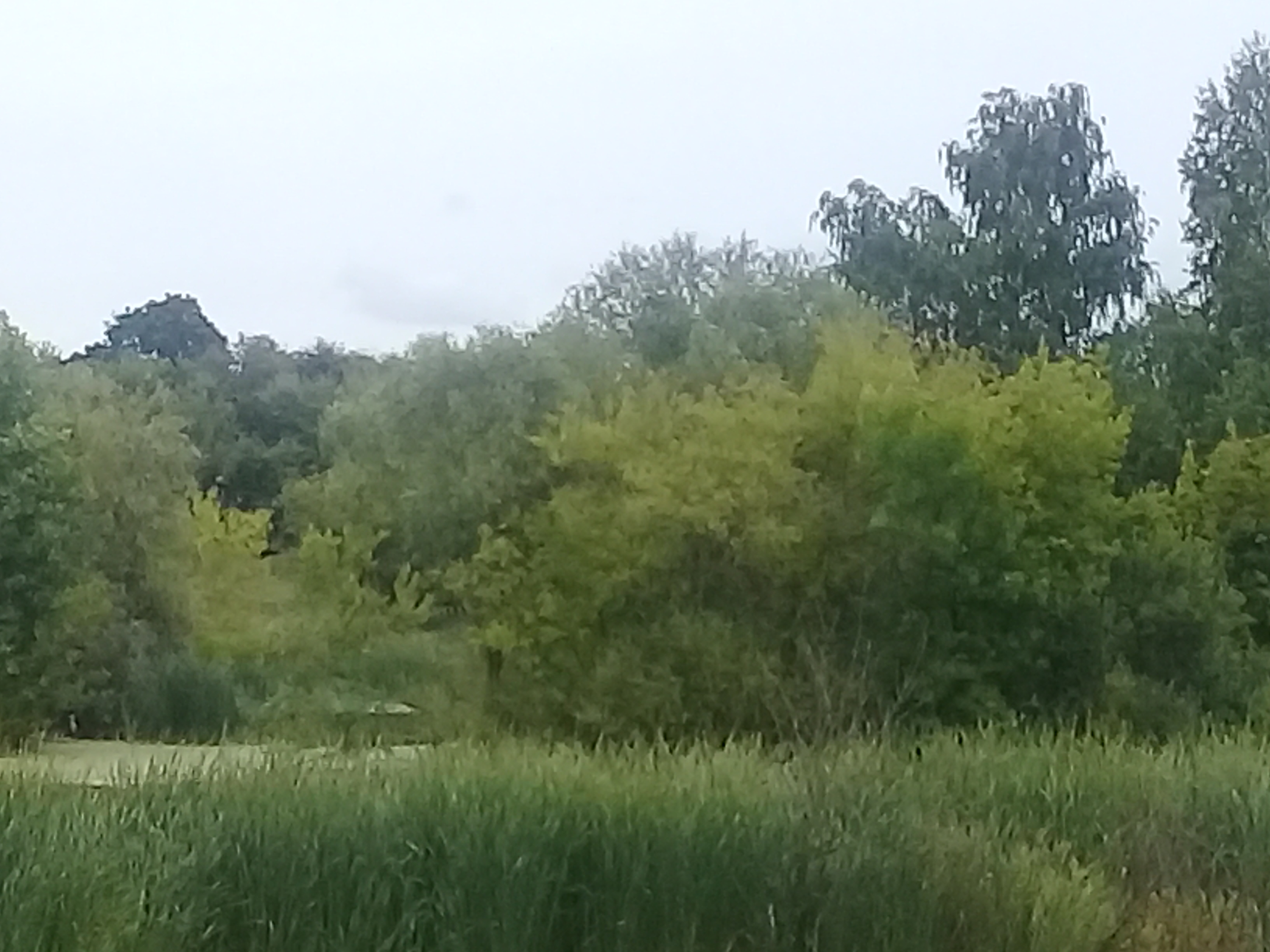 Фрагменты усадьбы Сукочева